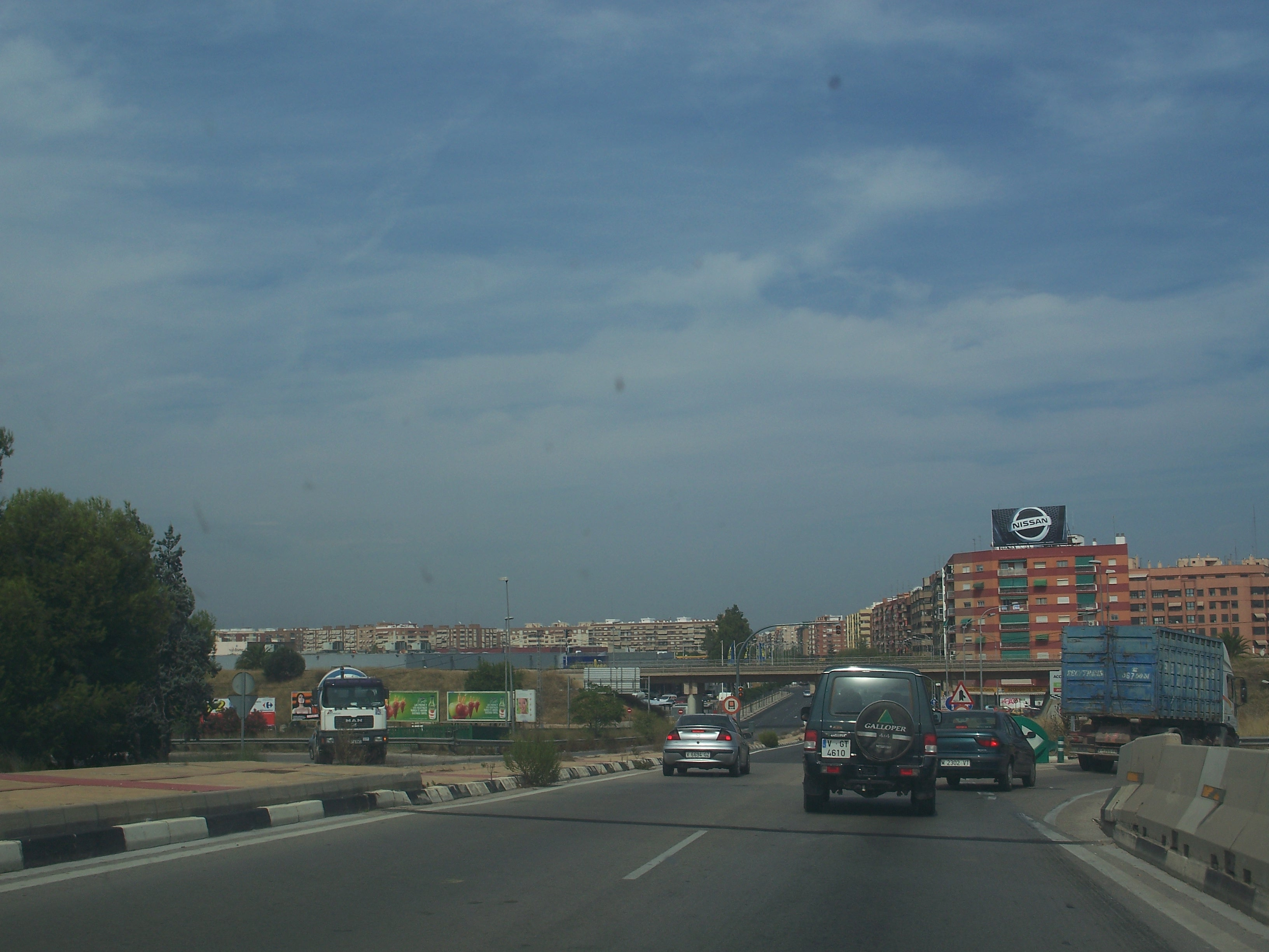 Camí Nou de Picanya - Entrada Sud a València.